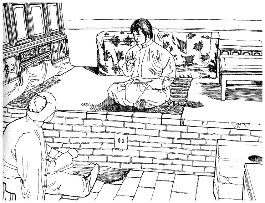 Кан в інтер'єрі будинку